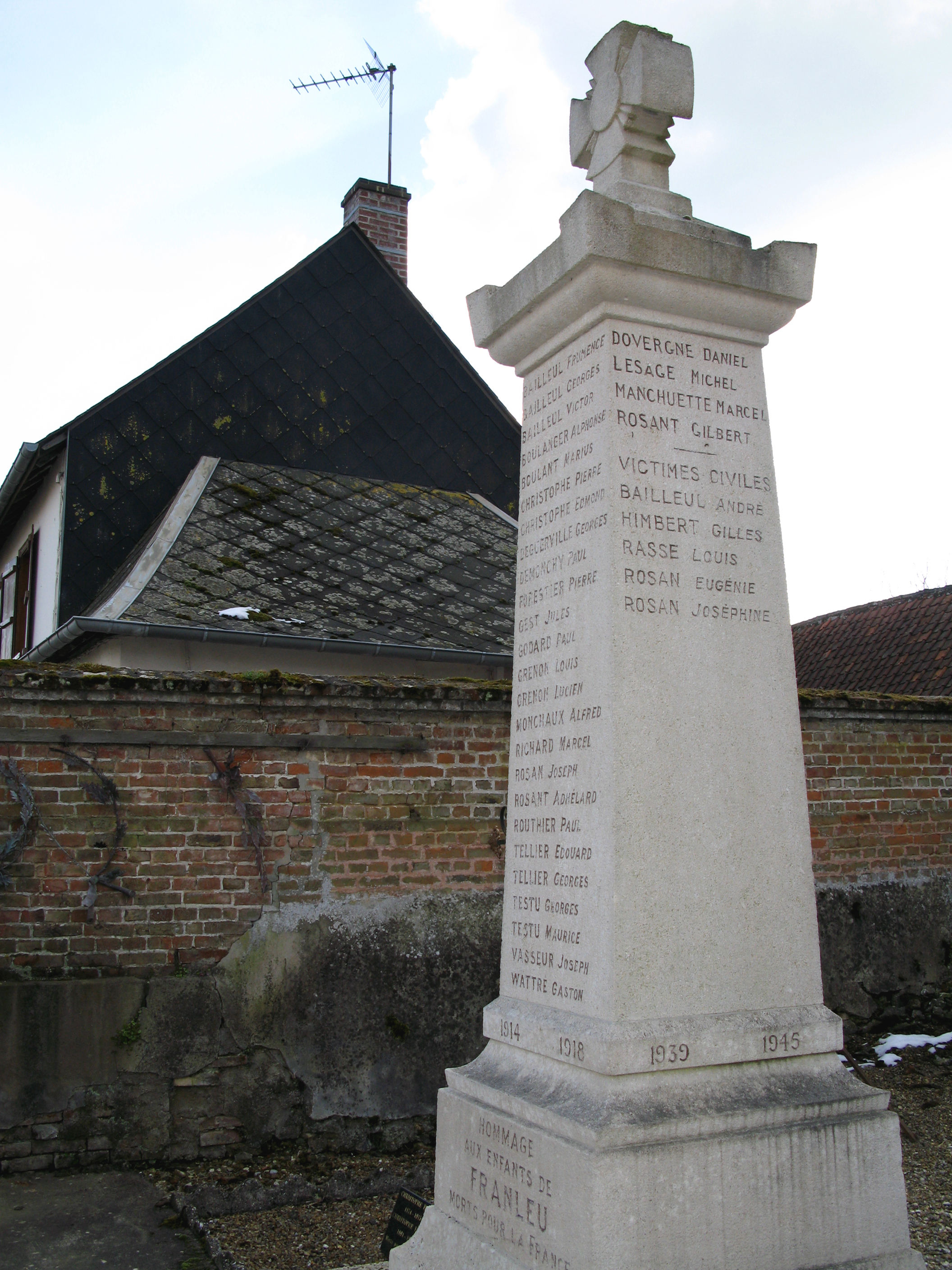 Franleu (Somme, France) - Le monument-aux-morts.